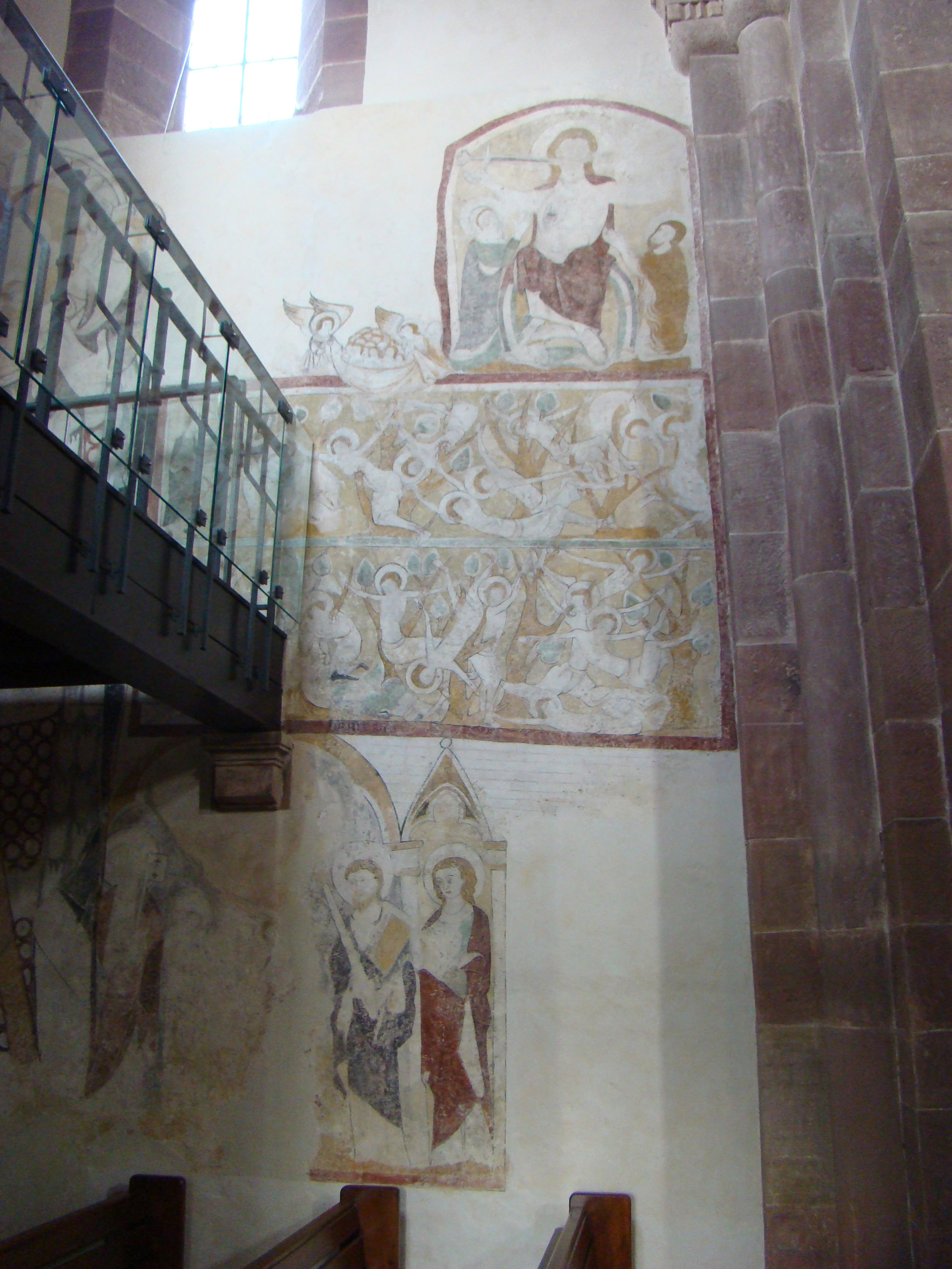 Klosterkirche Lobenfeld